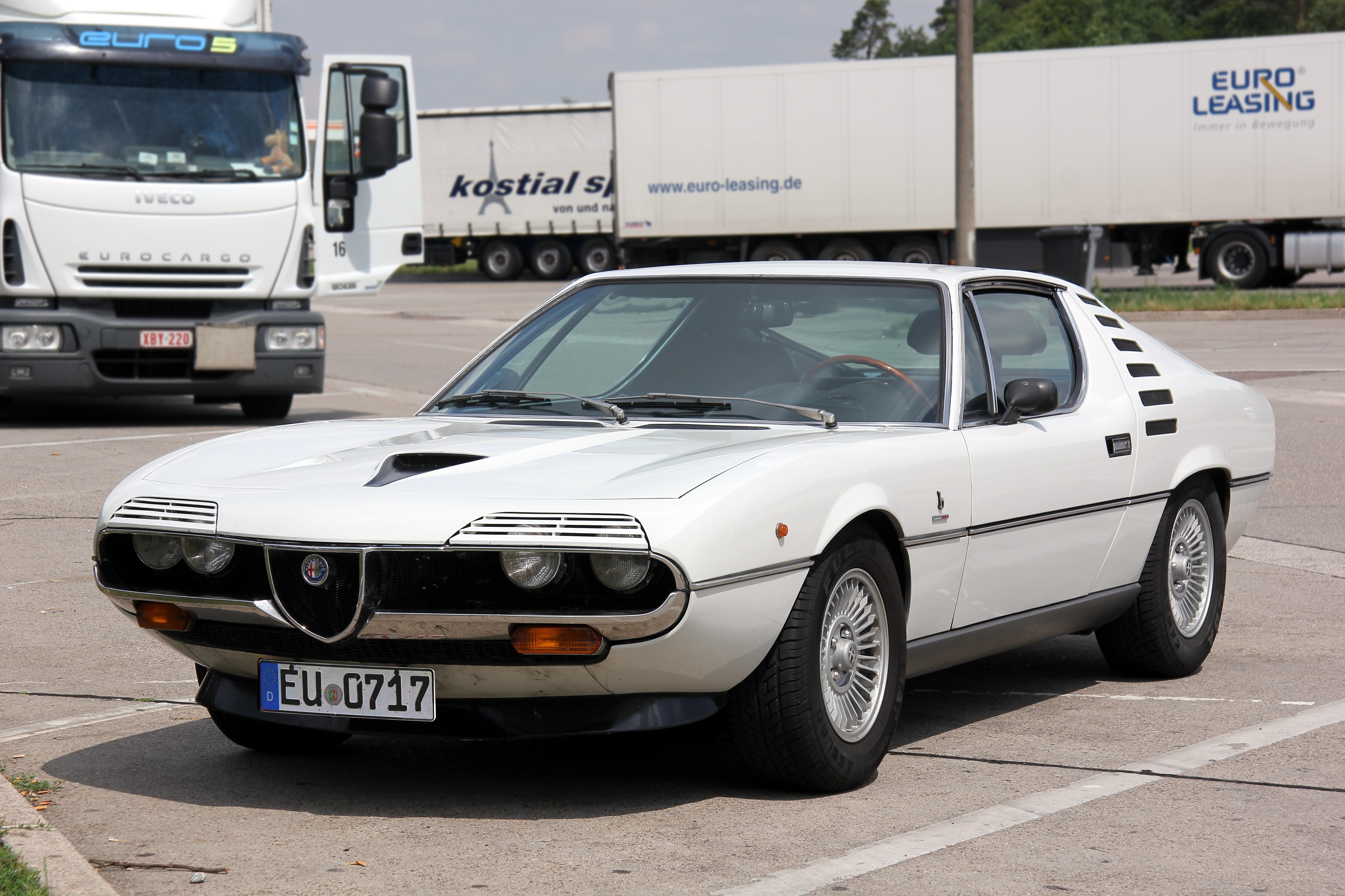 Alfa Romeo Montreal, gebaut von 1970 bis 1977